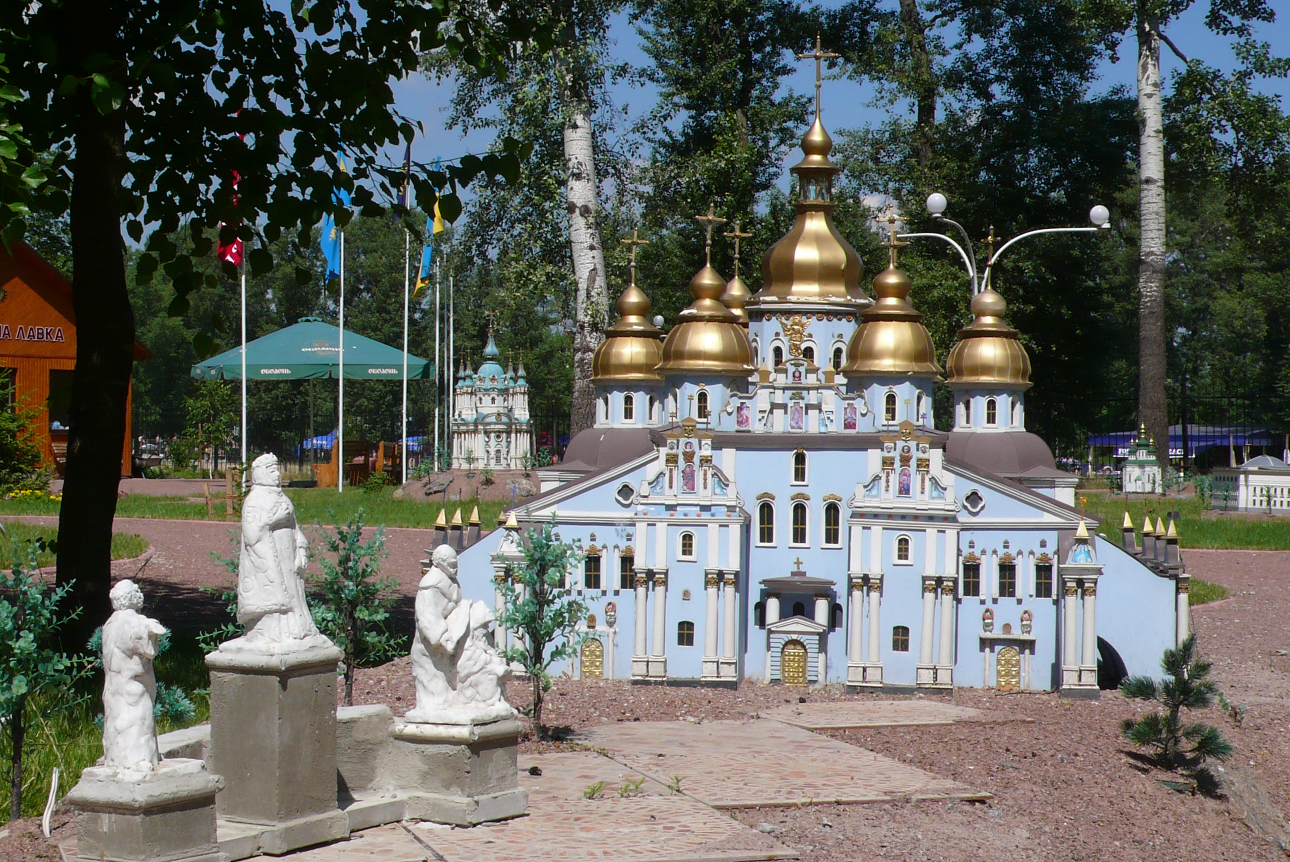 Парк "Киев в миниатюре". Ольга.